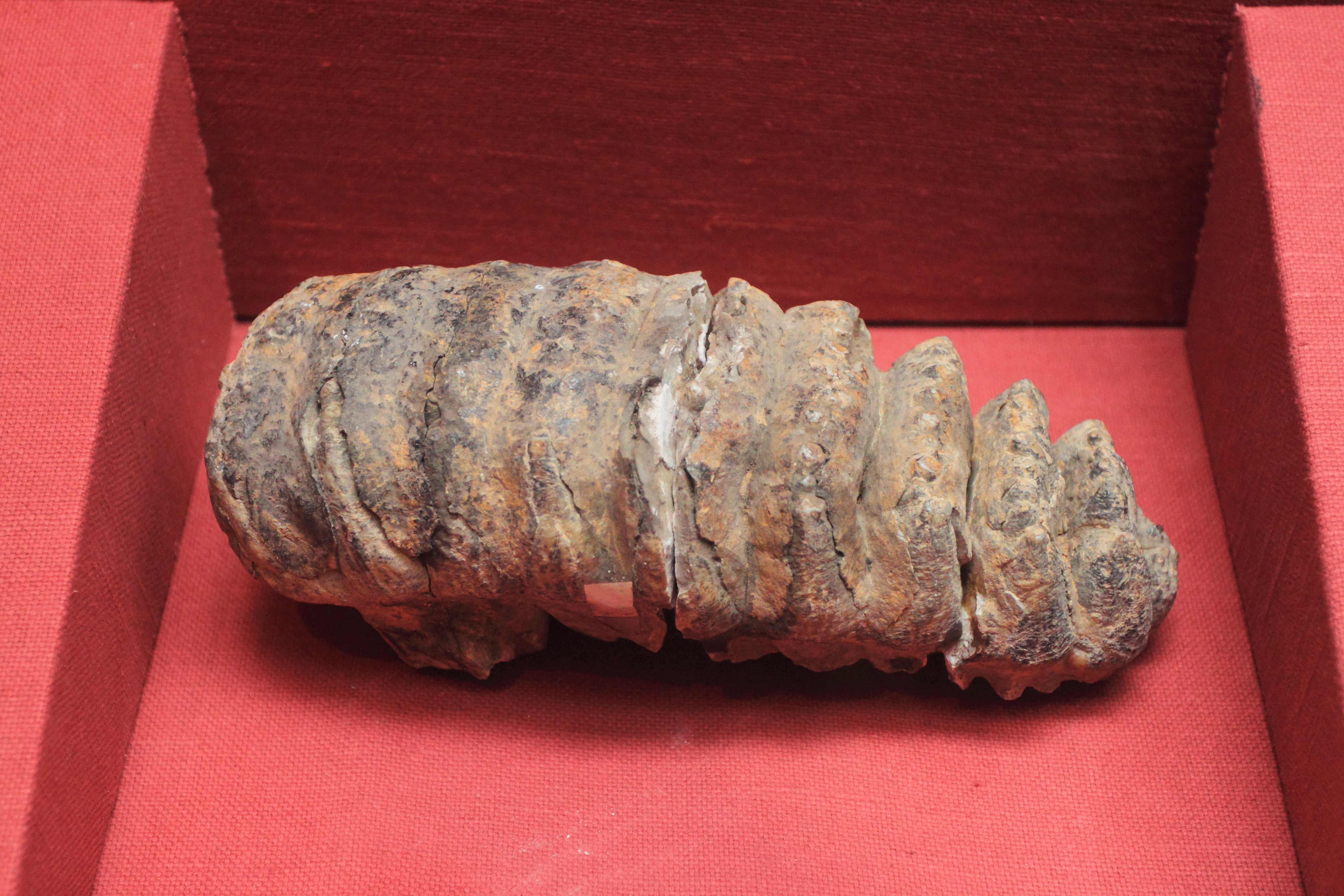 广东省博物馆 —— 广东历史文化陈列 —— 剑齿象臼齿，旧石器时代中期，韶关曲江马坝狮子岩洞穴遗址出土